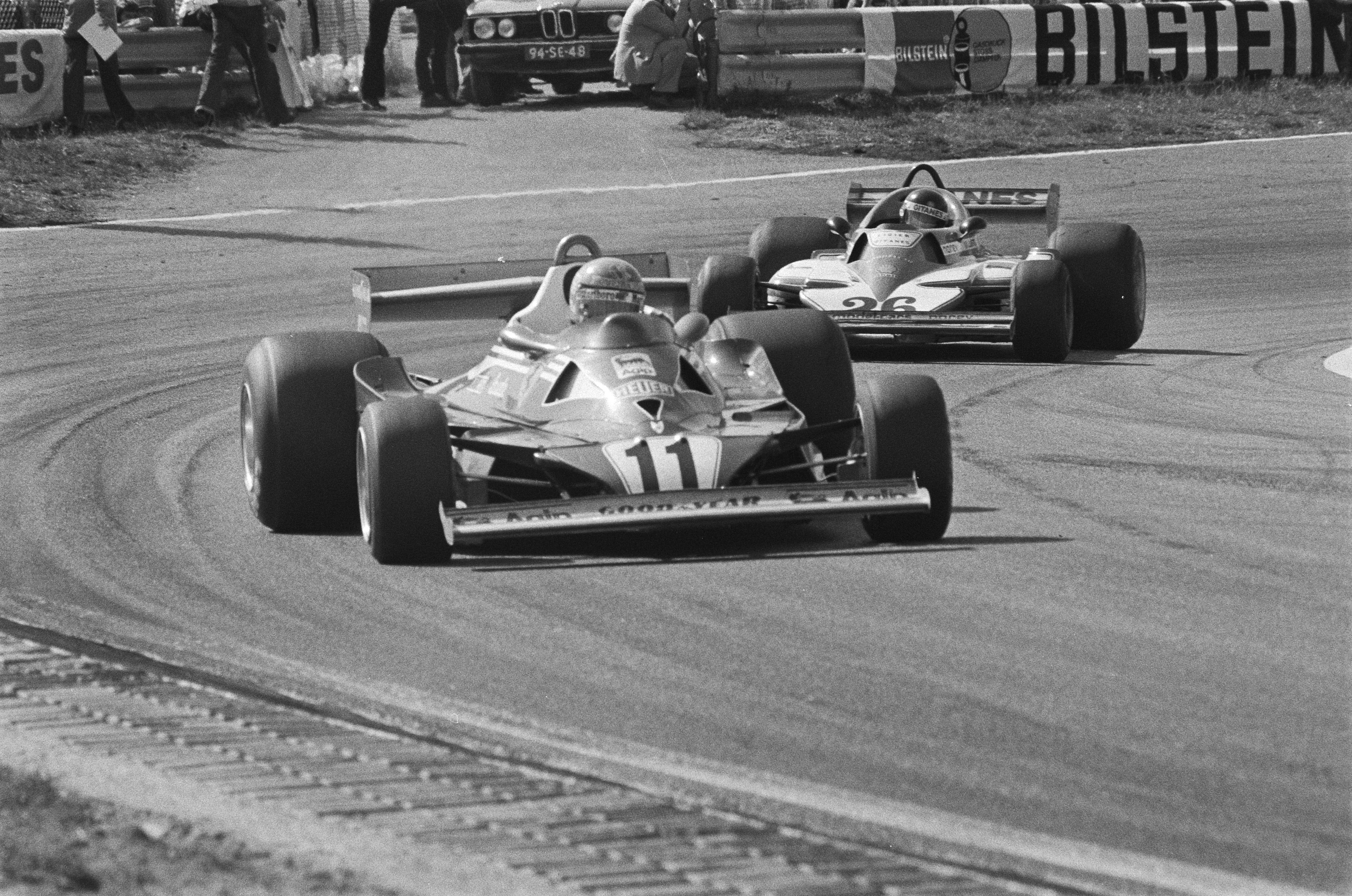 Grand Prix Zandvoort; Niki Lauda op kop met daarachter Jacques Laffite die tweede werd.